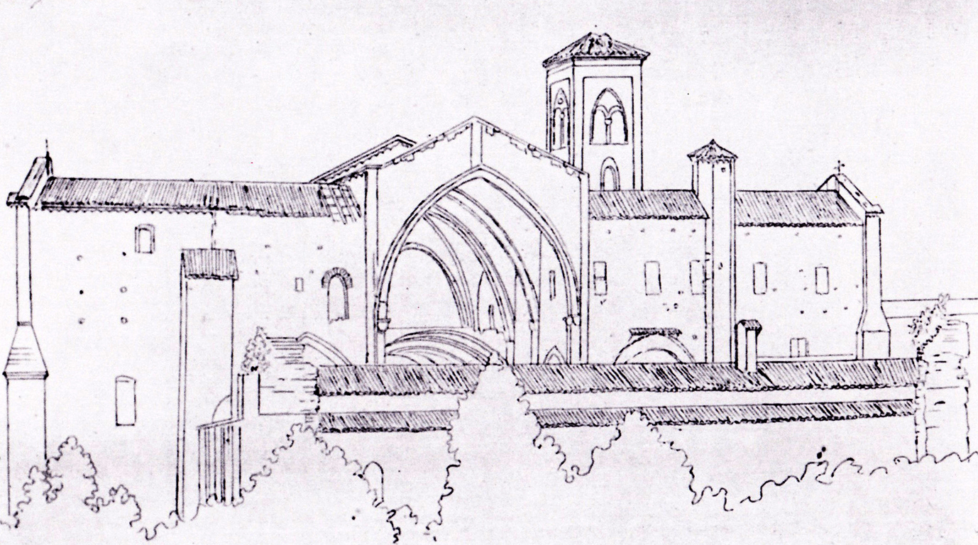 Disegno a penna di anonimo rappresentante i resti della Cattedrale di Santa Maria a Lodivecchio, agli inizi del XIX secolo.